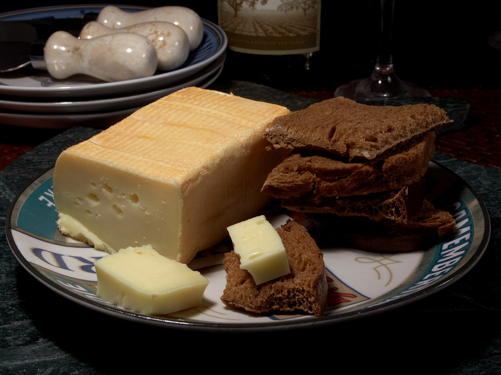 Limburger cheese